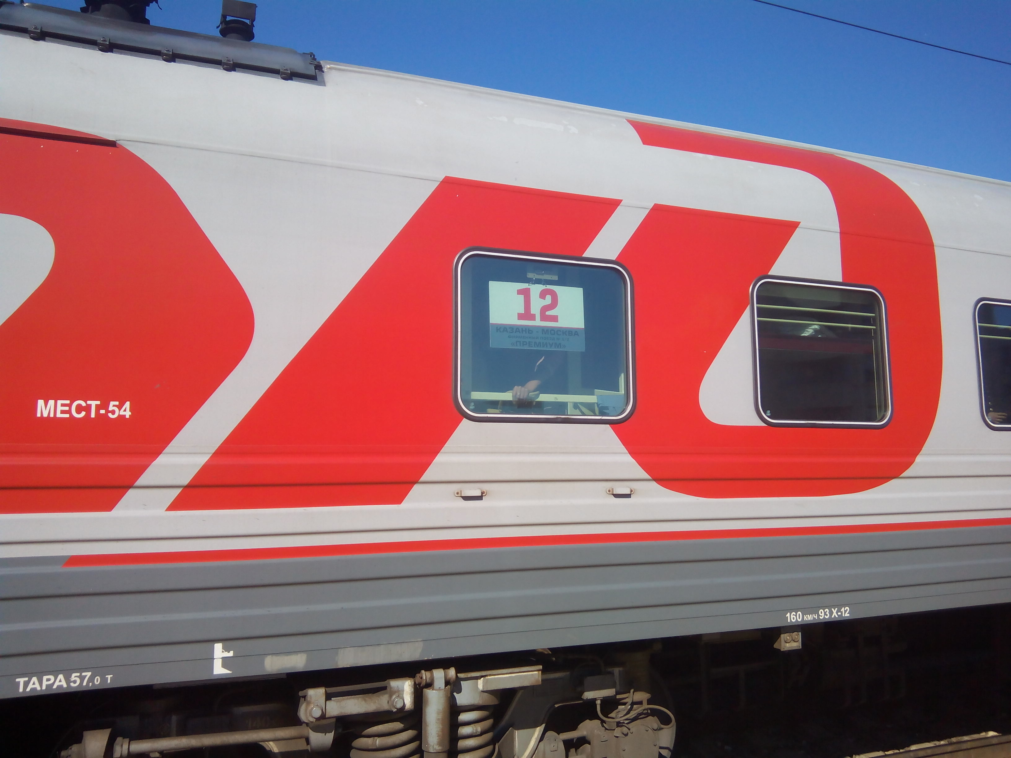 Вагон поезда Премиум